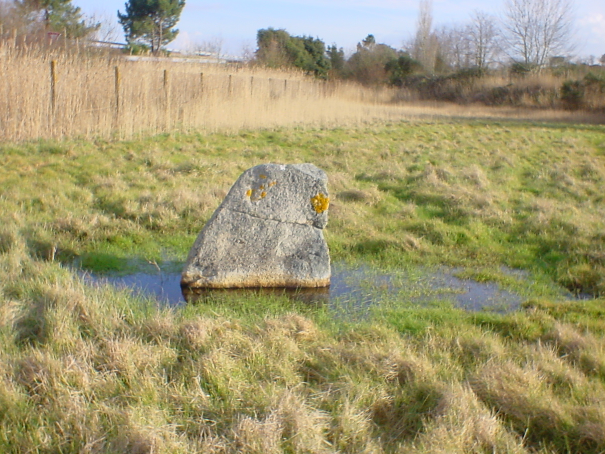 Pierre de Gargantua, (Classé, 1973)